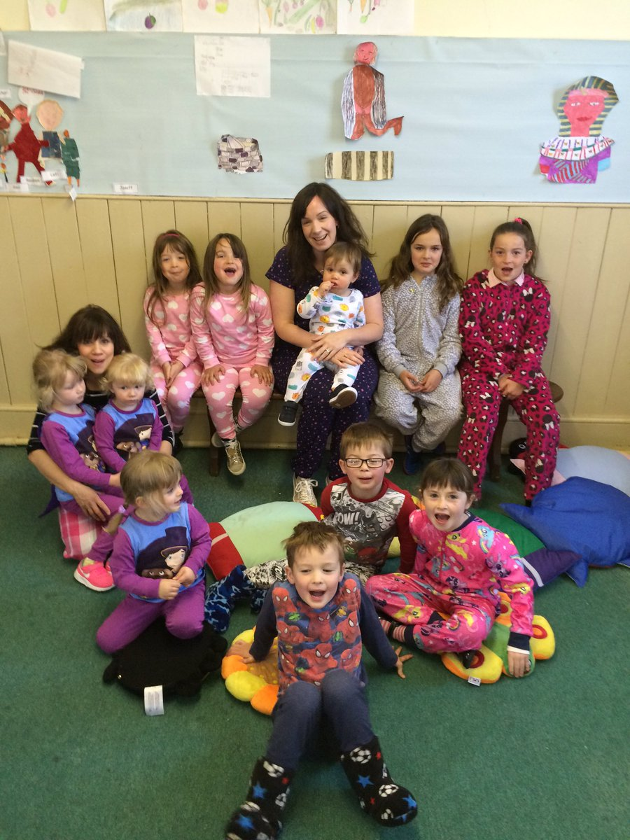 Criw Ysgol Sul Moreia, Llanfair Caereinion yn eu pyjamas